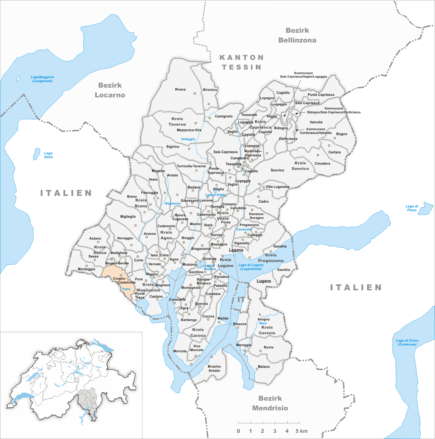 Municipality Croglio-Castelrotto Artist: Tschubby